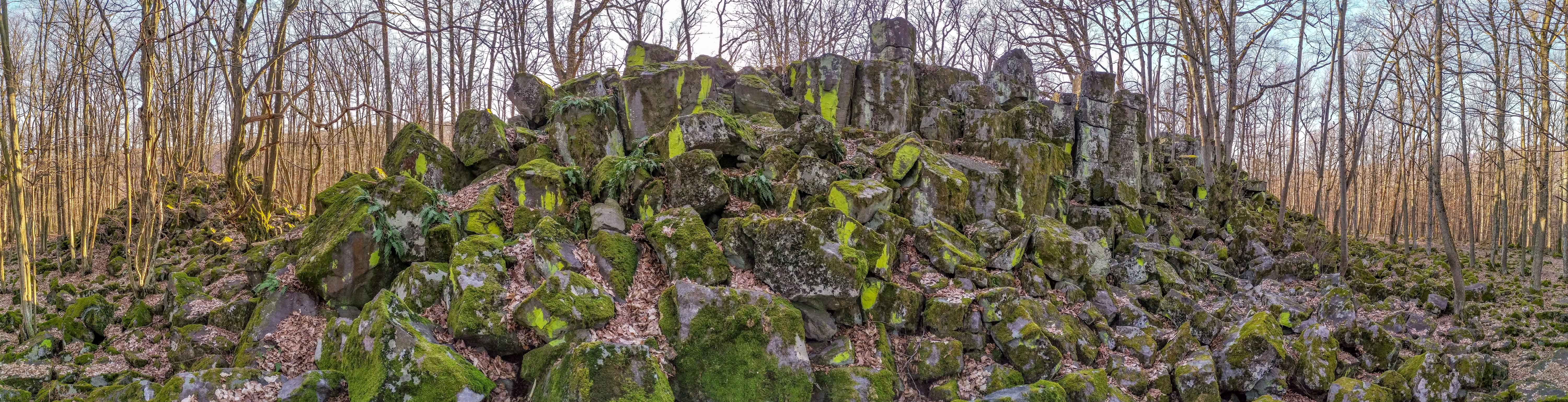 Krupinské bralce, panoramatický záber